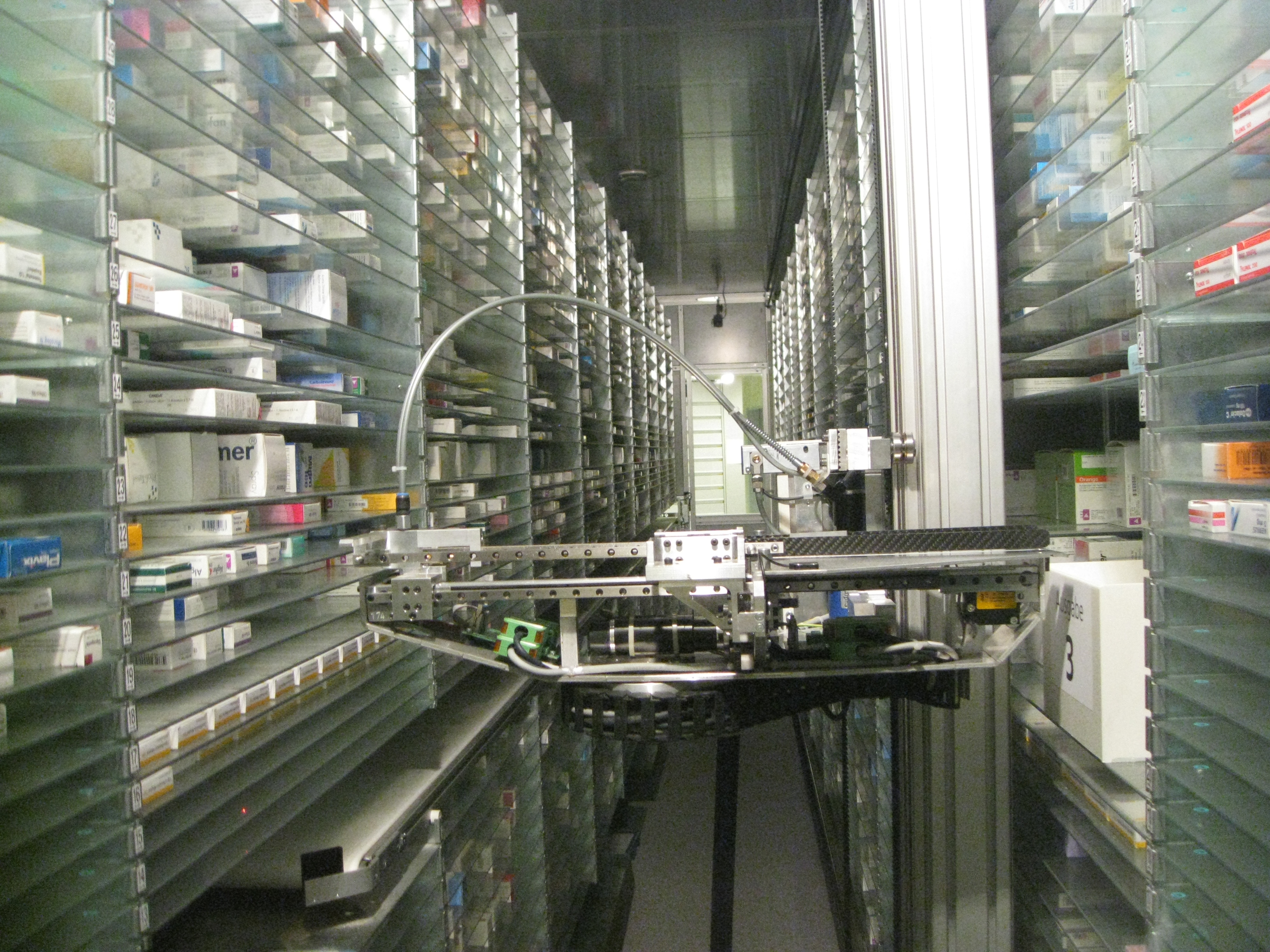 Warenbewirtschaftungsroboter für Medikamente der Firma Rowa